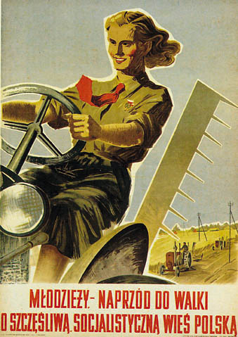 "Młodzieży. Naprzód do walki o szczęśliwą socjalistyczną wieś polską" - socrealistyczny plakat propagandowy PRL. Pierwowzorem postaci z plakatu była traktorzystka Magdalena Figur